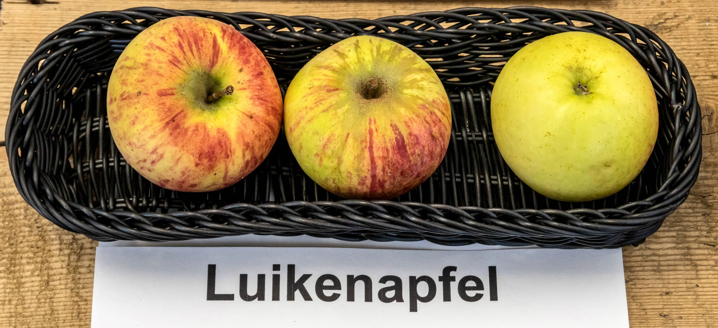 Alte Apfelsorten, von denen es im Badischen noch tragende Bäume gibt. Alle Aufnahmen au dem Oktober 2015